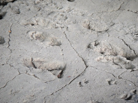 Huellas cruzadas